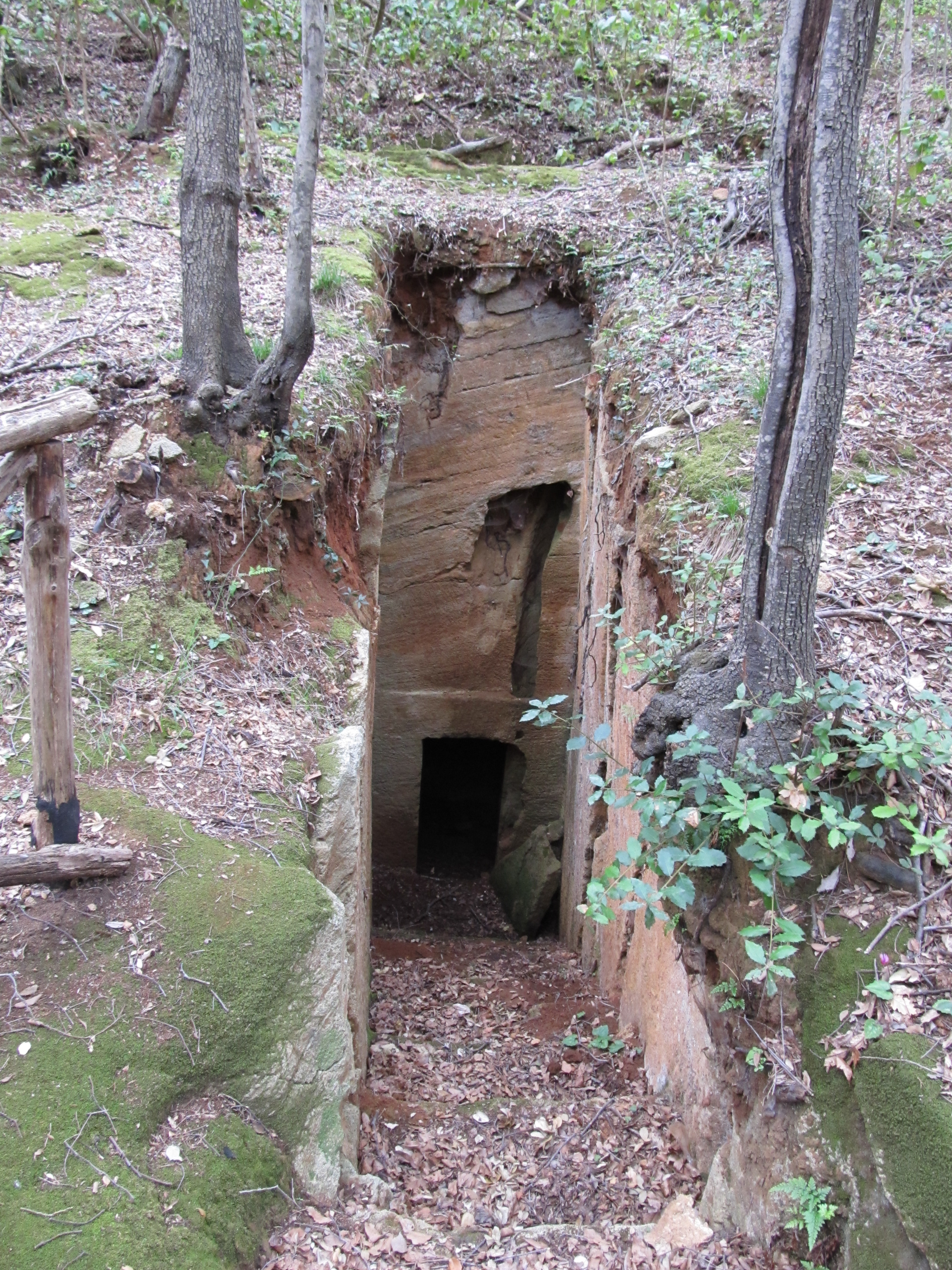 Tomba estrusca a camera scavata nel tufo situata nella Necropoli delle Grotte nel Parco Archeologico di Baratti e Populonia.